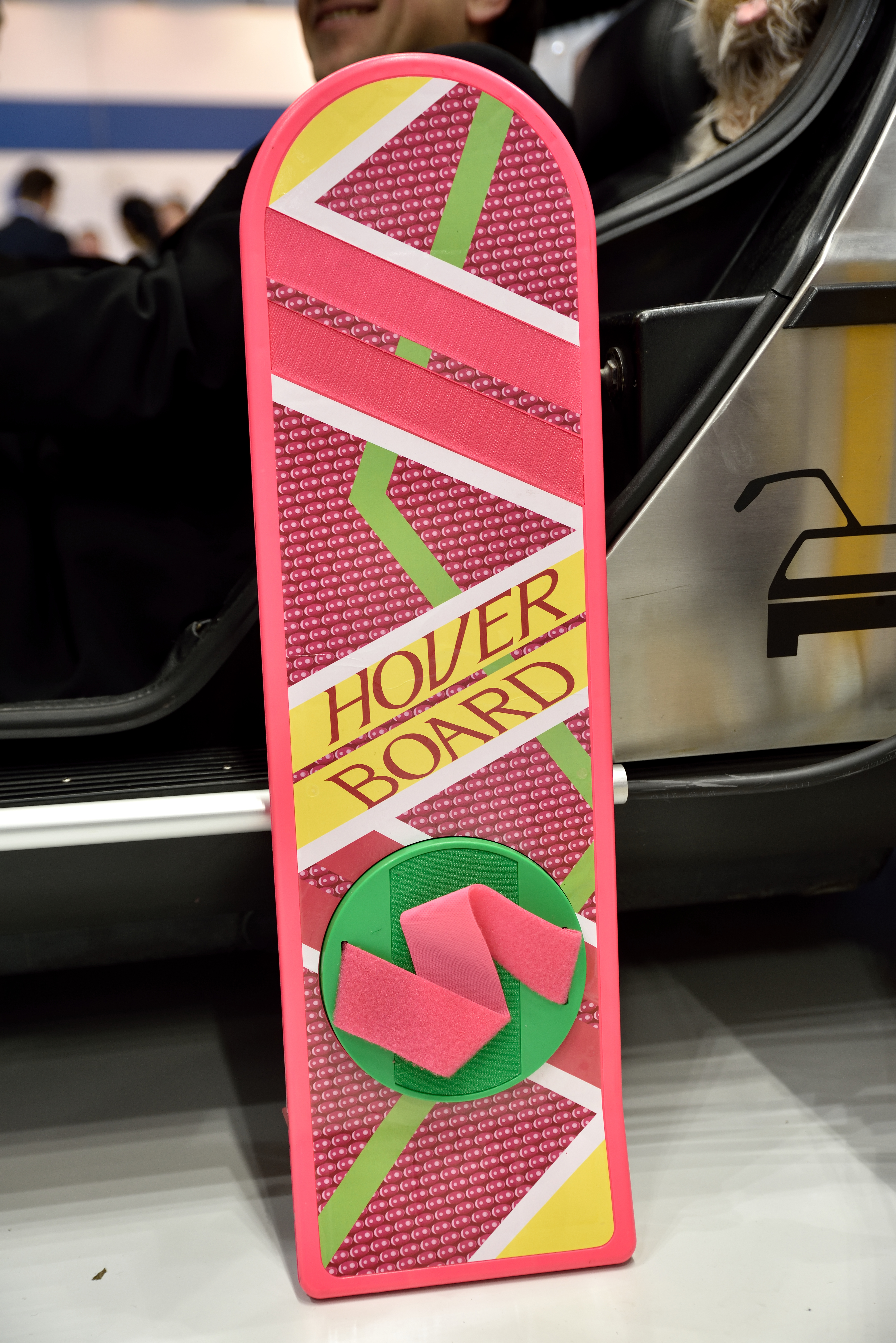 Hoverboard (Nachbau) bei der CeBIT 2016 in Hannover